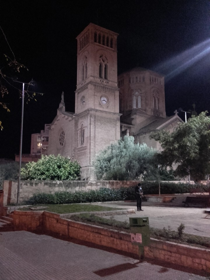 Iglesia de Santa Catalina, Palma de Mallorca, España.